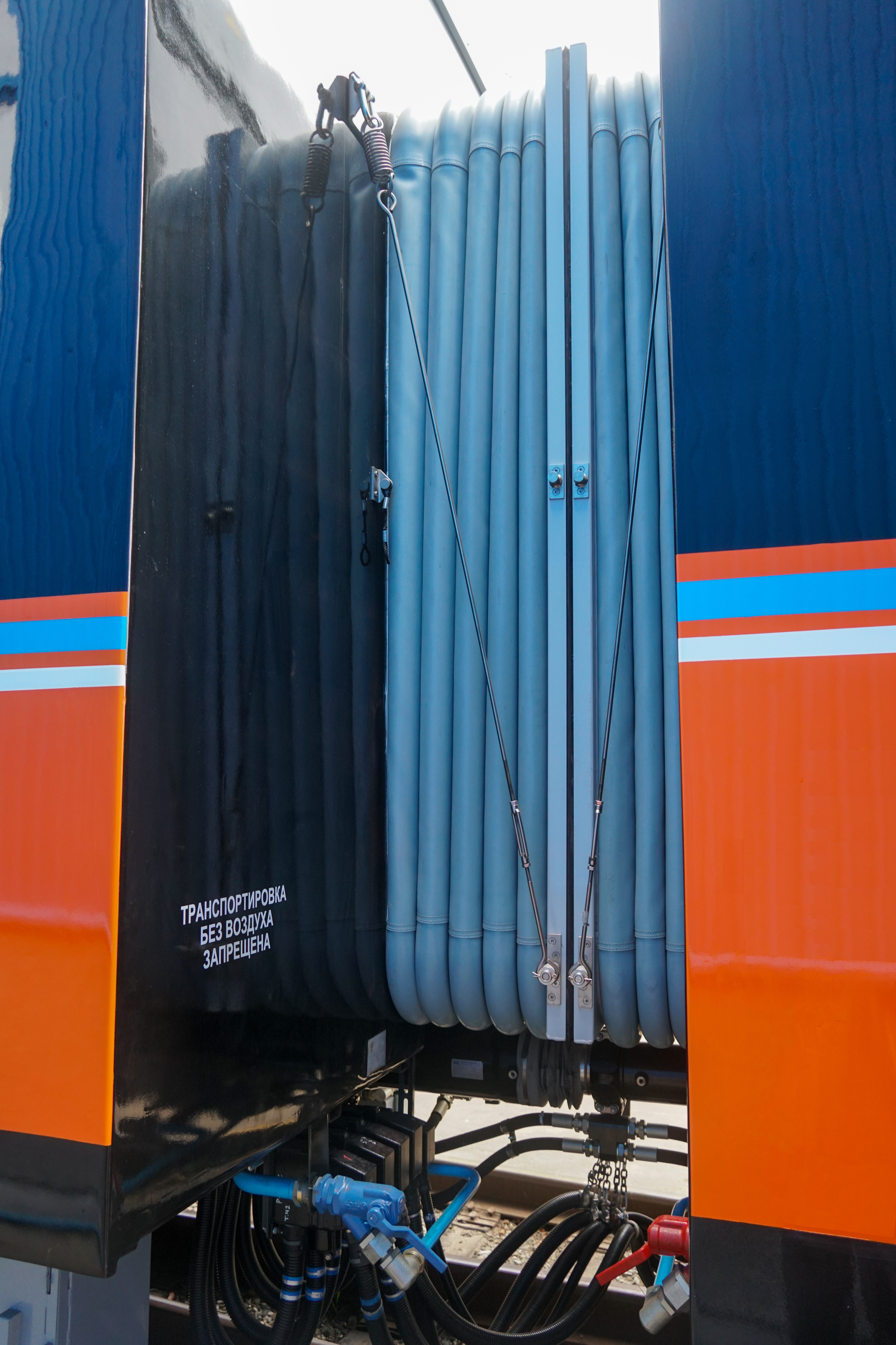 Межвагонный переход рельсового автобуса (дизель-поезда) РА3-005